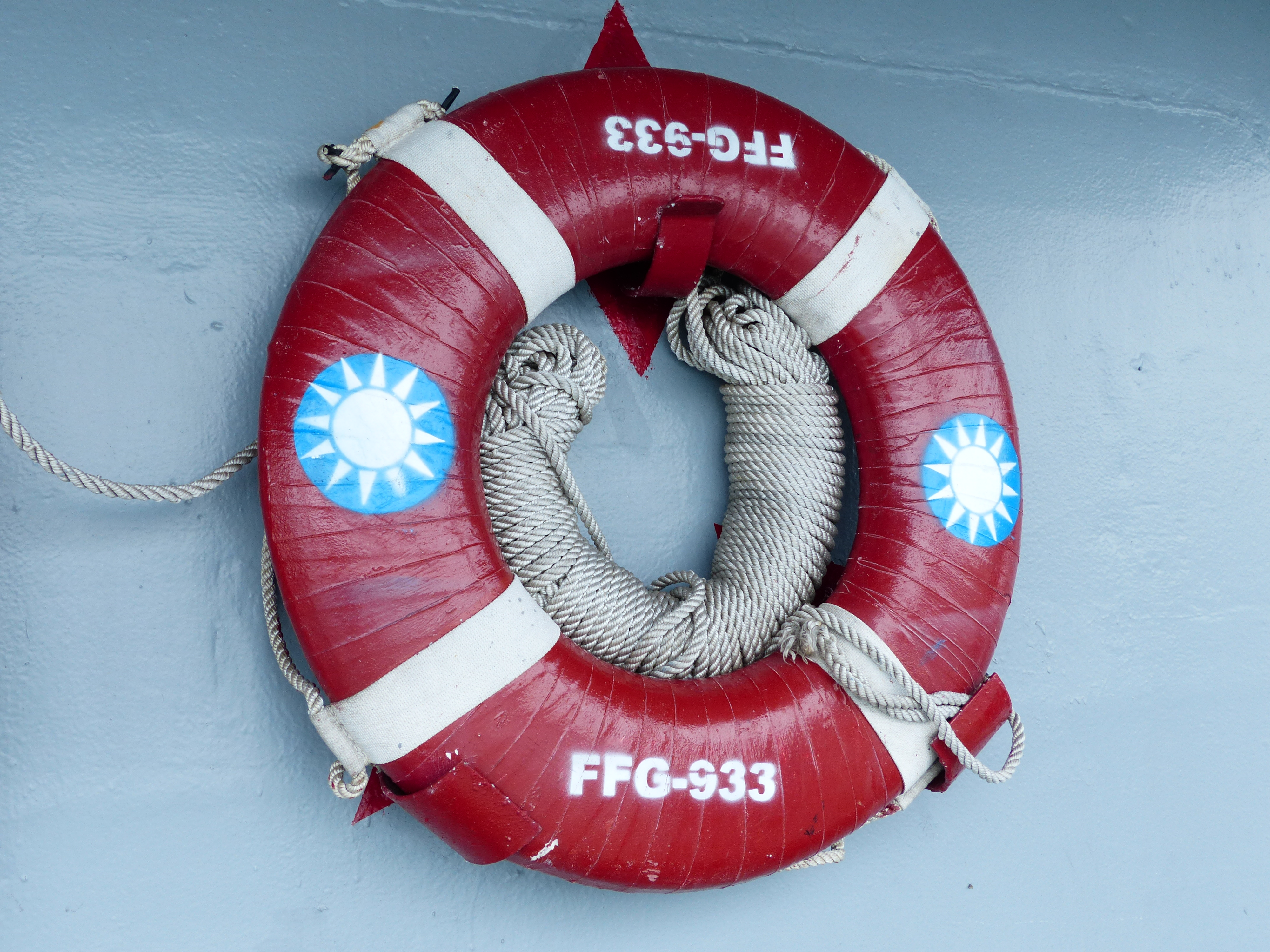 中華民國海軍巡防艦鳳陽（FFG-933）右舷通路壁上的救生圈，攝於2013年中正軍港營區開放活動。